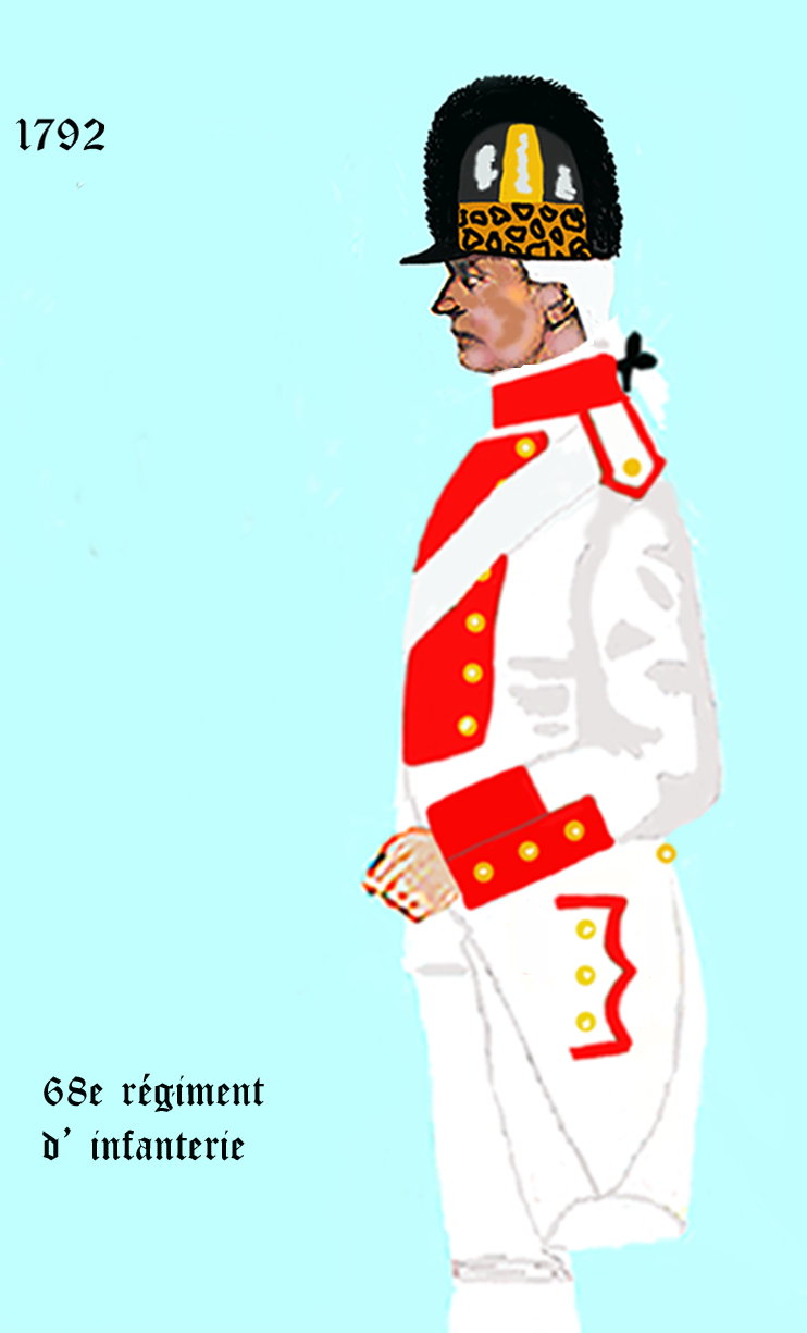 Uniform eines königlich französischen Infanterie-Regiments gemäß Dekret von 1792. - Entnommen und überarbeitet aus: „LES UNIFORMES ET LES DRAPEAUX DE L'ARMÉE DU ROI“ Marseille 1899.